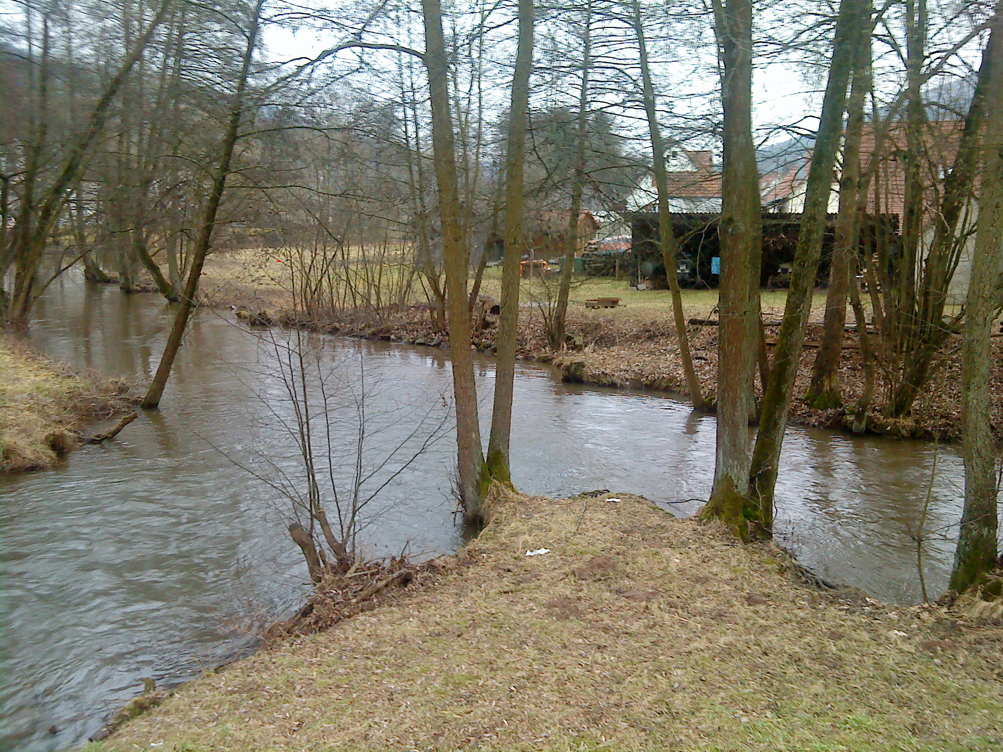 Mündung des Aubaches (rechts) in die Lohr (links), in Partenstein